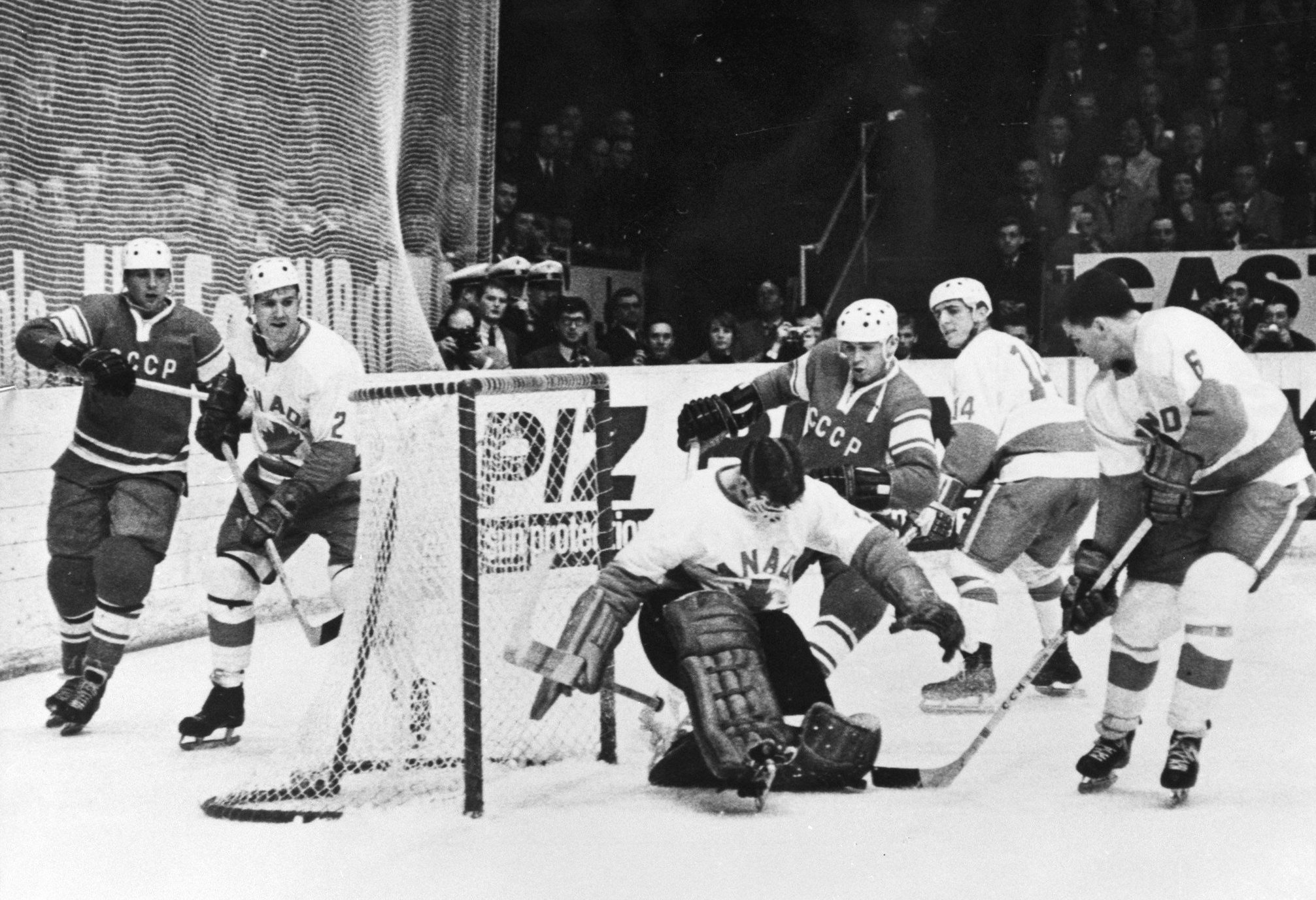 WK ijshockey te Wenen, wedstrijd Rusland tegen Canada 2-1 voor het doel de Canadees